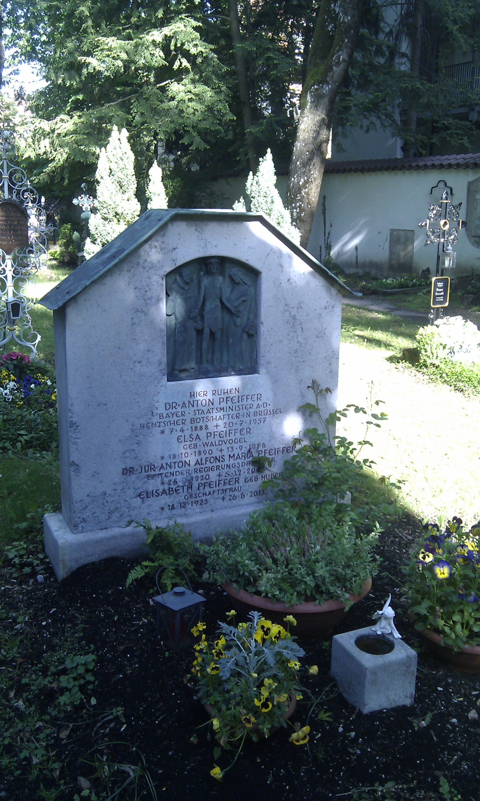 Familingrab der Familie Anton Pfeiffer (1888–1957) auf dem Winthirfriedhof, München.